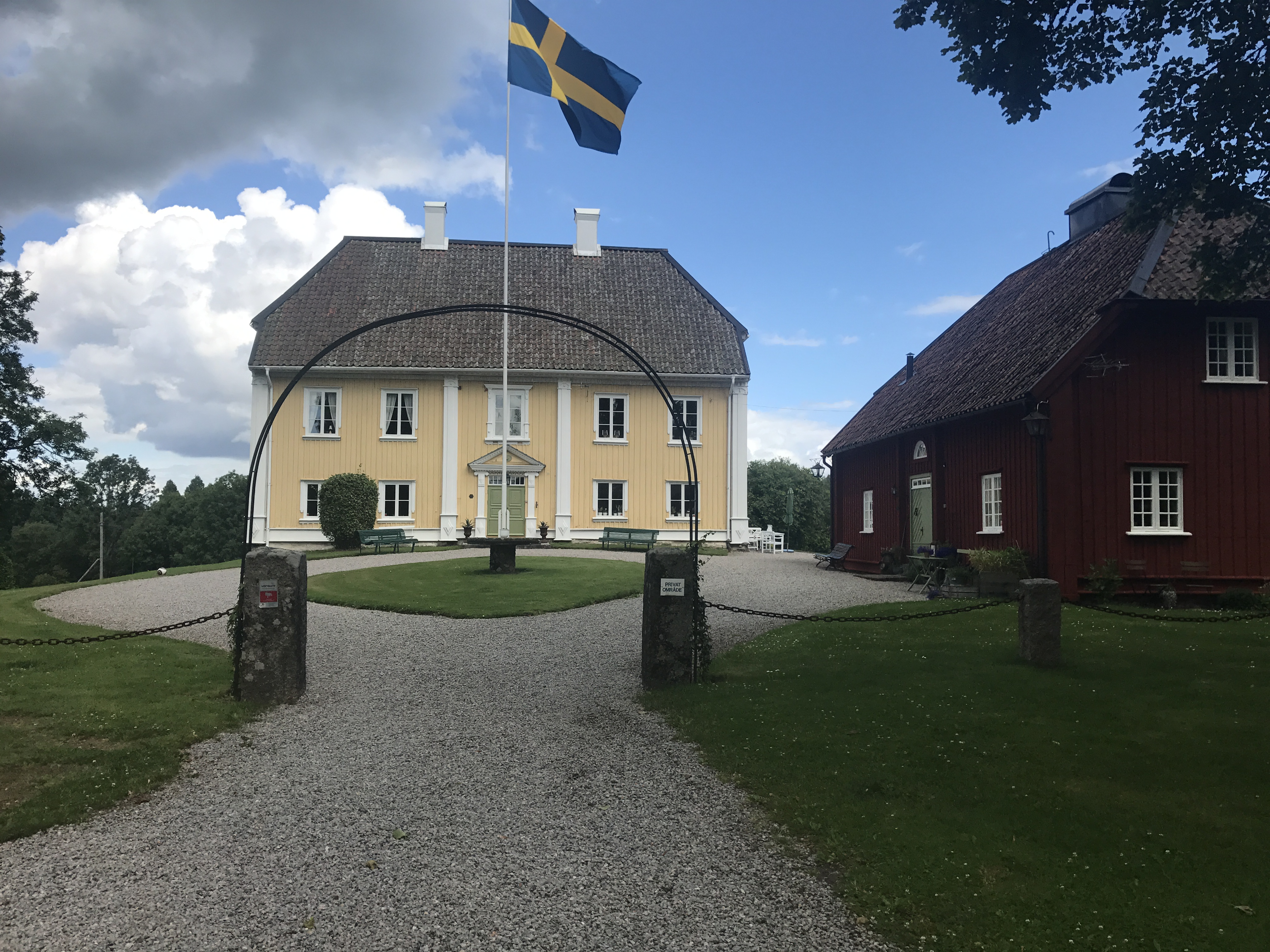 Källebacka Säteri